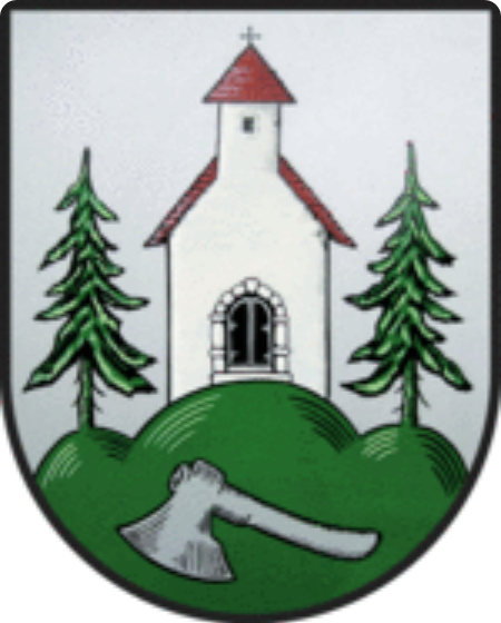 Das Wappen der Gemeinde zeigt eine kleine Kapelle auf einem dreiteiligen Hügel, eingebettet zwischen zwei Tannen. Im grünfarbenen Hügel selbst ist eine graue Axt eingelassen.